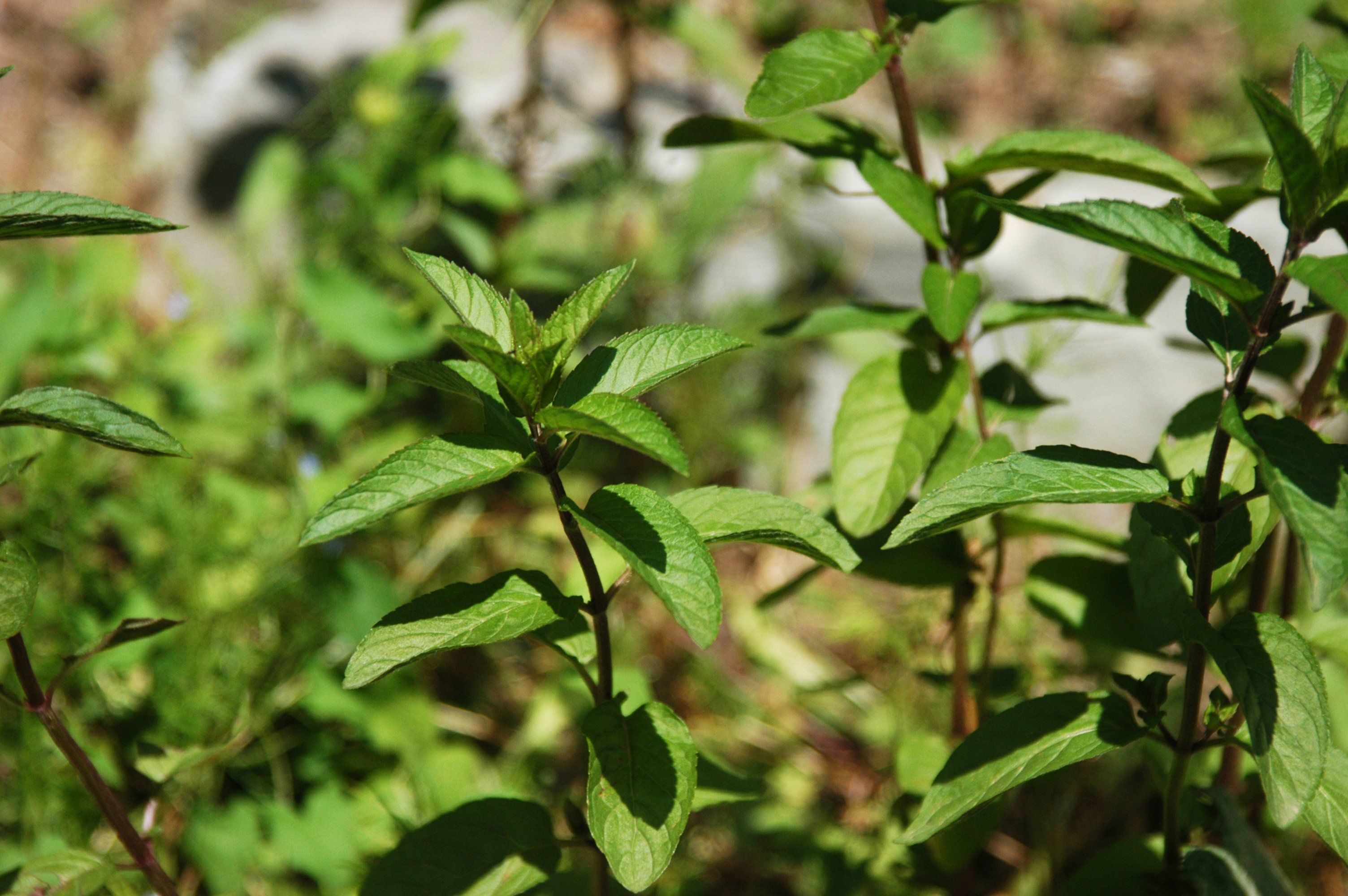 (de) Stark duftende Pfefferminze (Mentha × piperita) im Garten